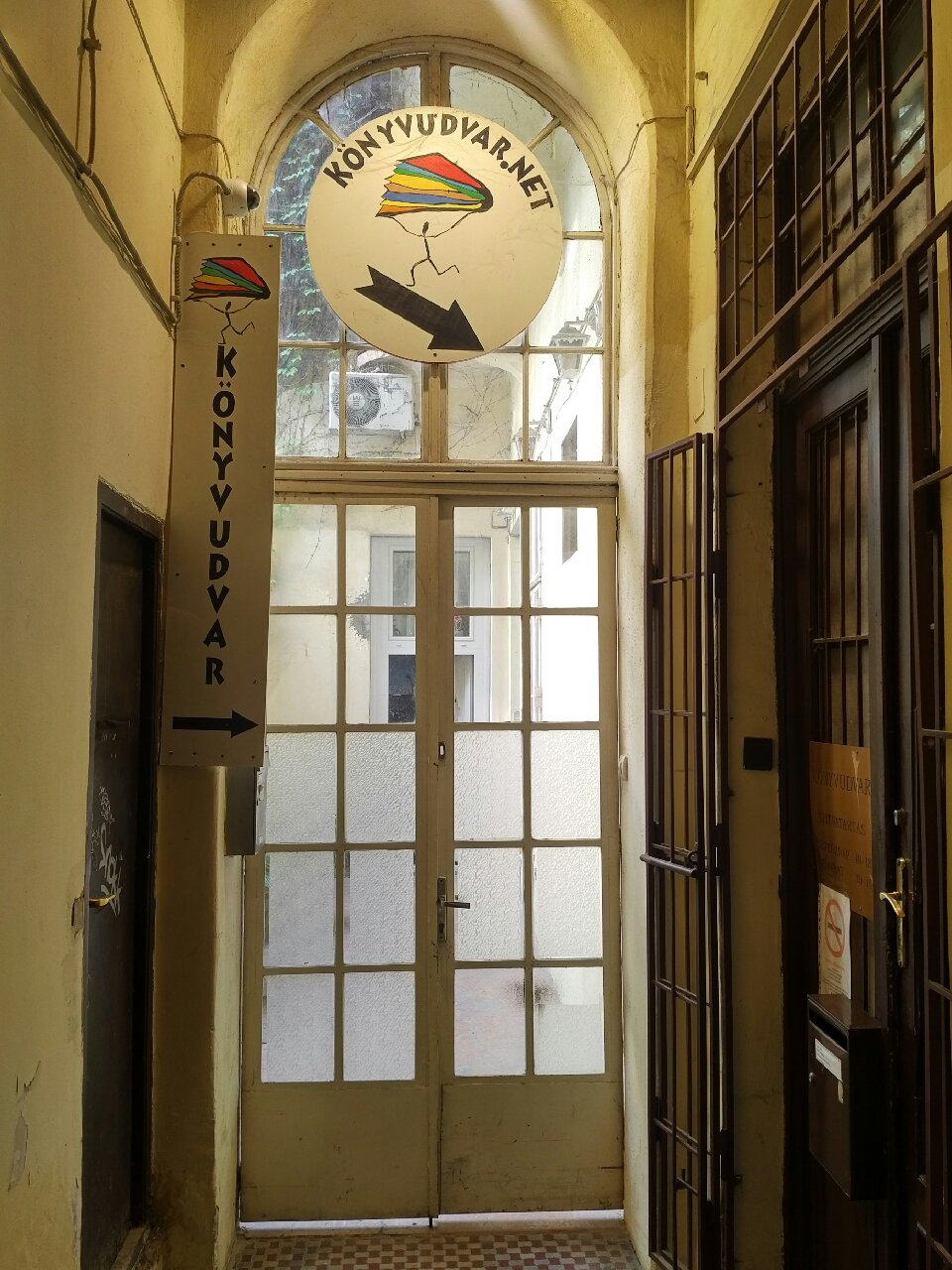 A Könyvudvar bejárata az Unger-ház földszintjén.